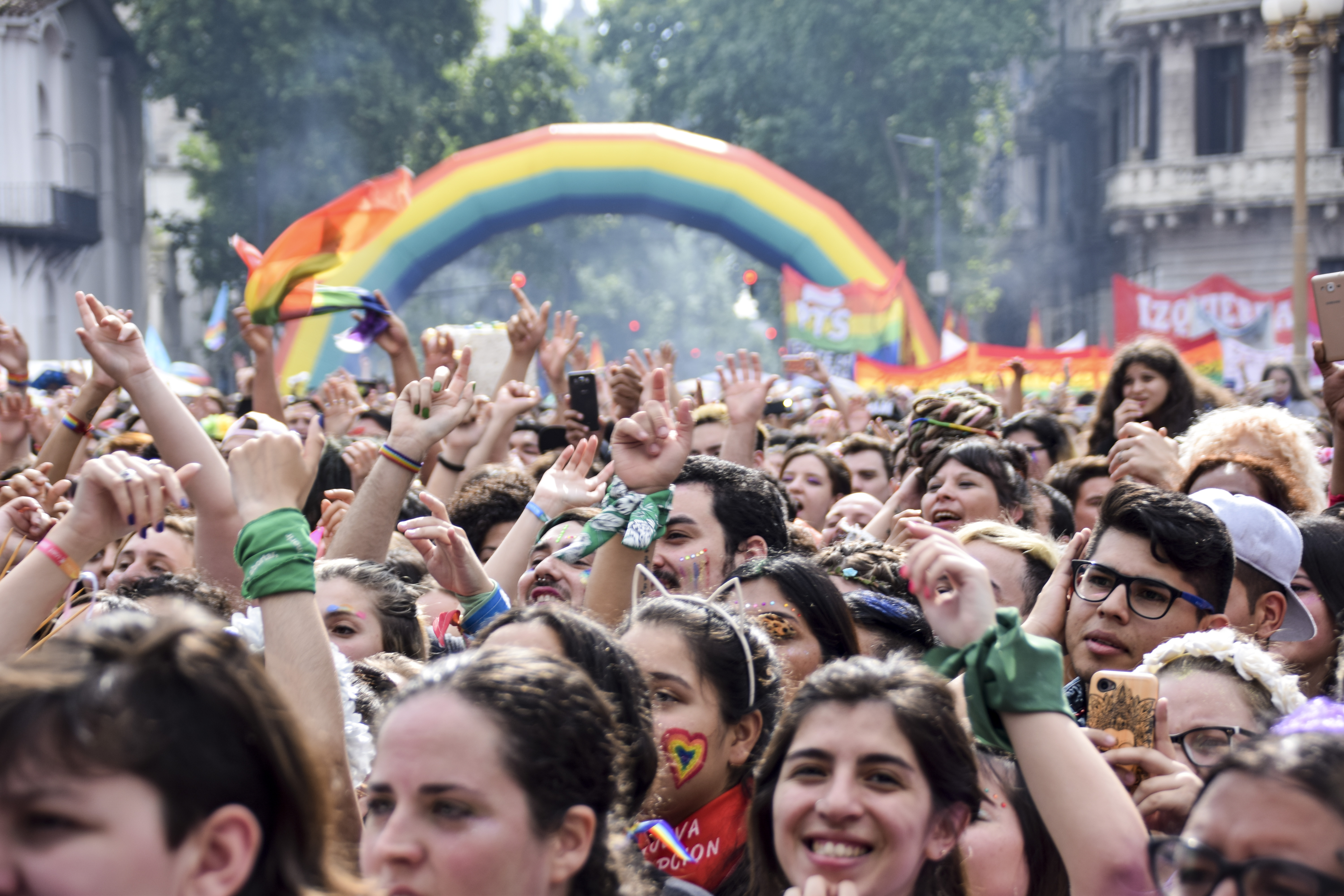 Buenos Aires, 17 de noviembre de 2018._Miles de personas celebran la 27° Marcha del orgullo LGBTIQ (Lesbianas, Gays, Bisexuales, Trans, Intersexuales y Queers) de Buenos Aires.El evento arrancó temprano el sábado con una feria en Plaza de Mayo, donde hubo shows de Mimi Maura y Jimena Barón, entre otros. Desde las 17, una caravana de carrozas marchó hasta la Plaza de los Dos Congresos. Fotos Kaloian/ Secretaría de Cultura de la Nación.